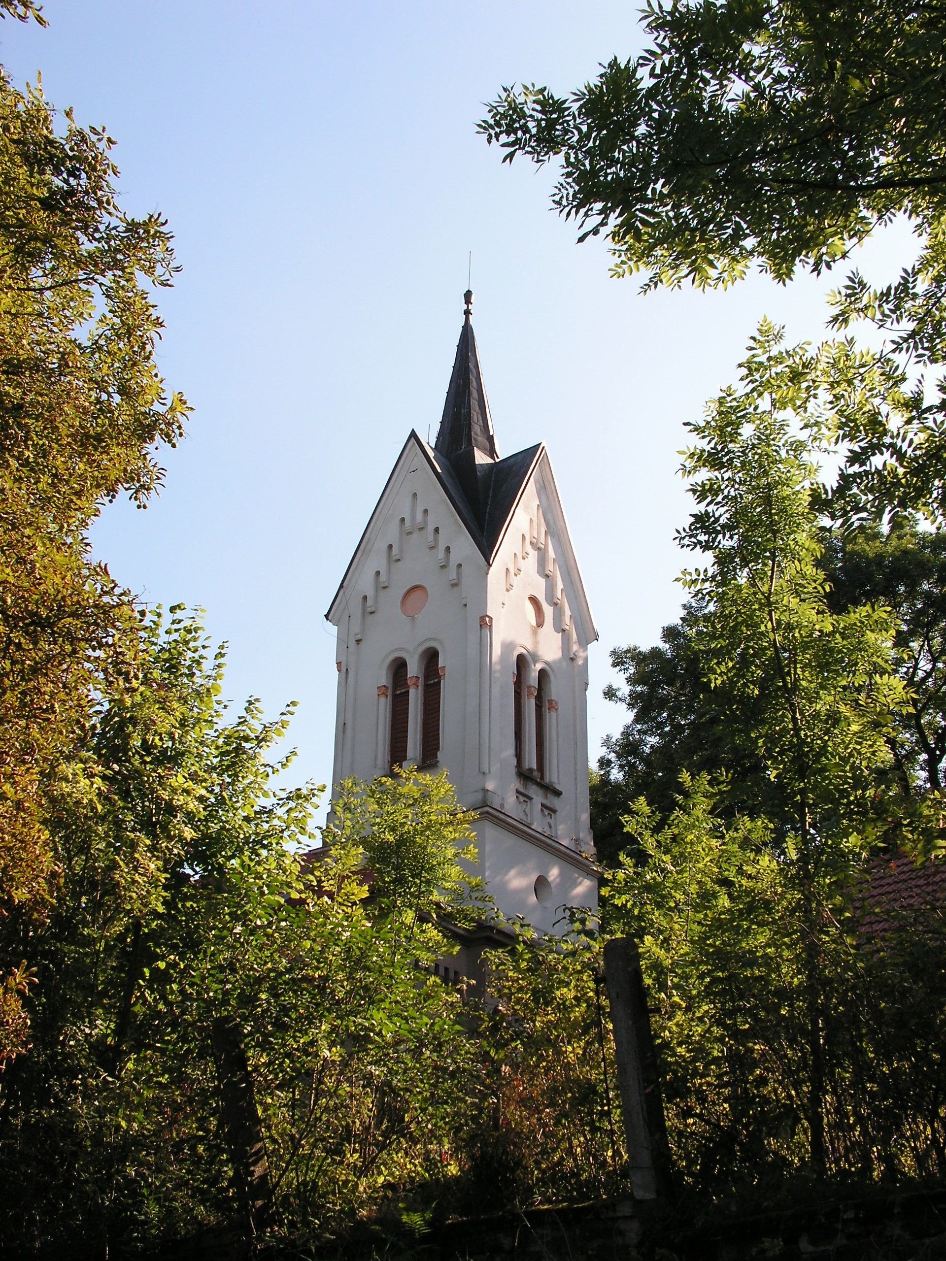 Evangelický kostel v Opatovicích u Zbýšova.